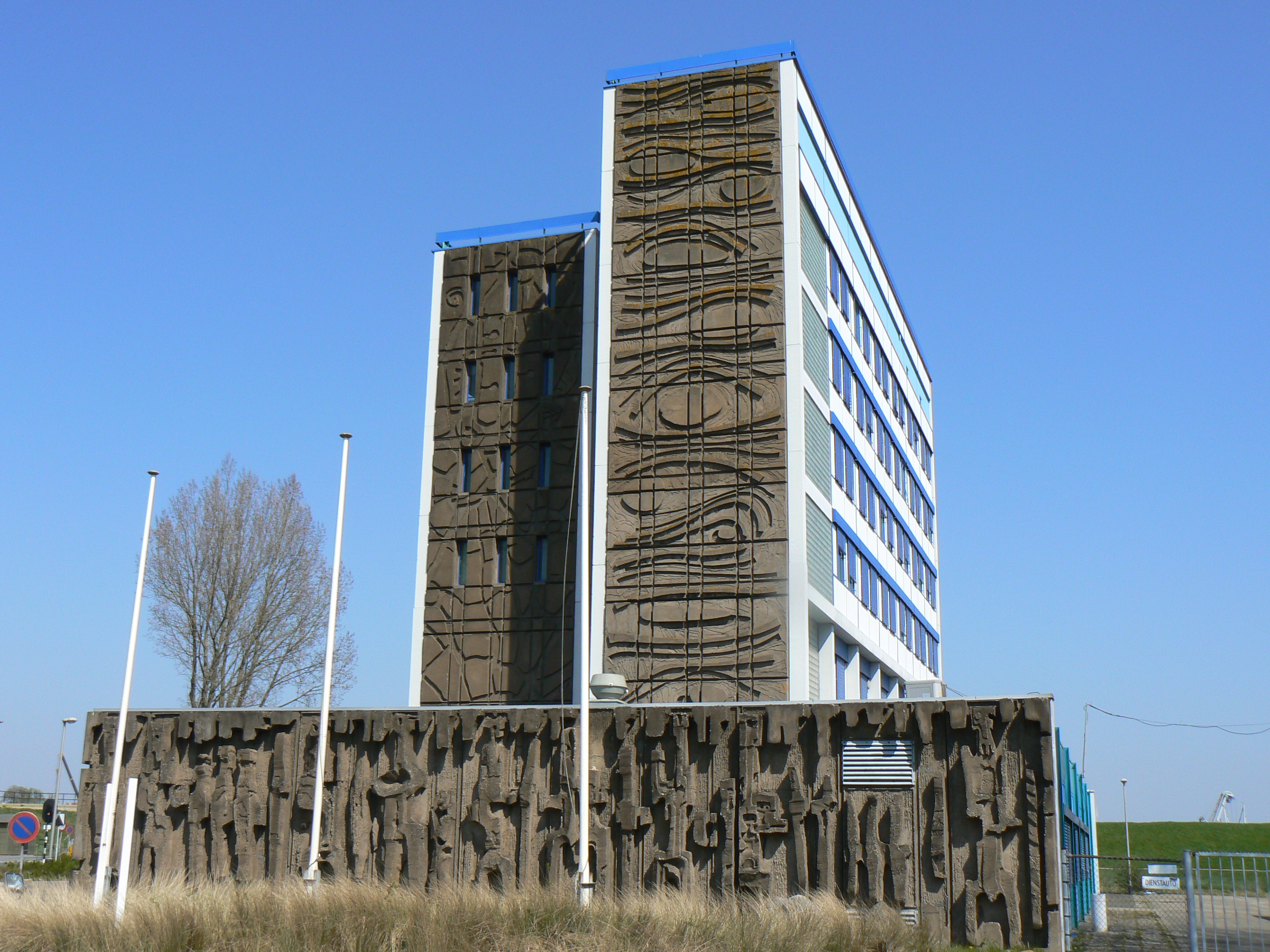 Eemsmondgebouw (1973) by J.H. de Gruyter with sculptures by Jaap van der Meij in Delfzijl/The Netherlands